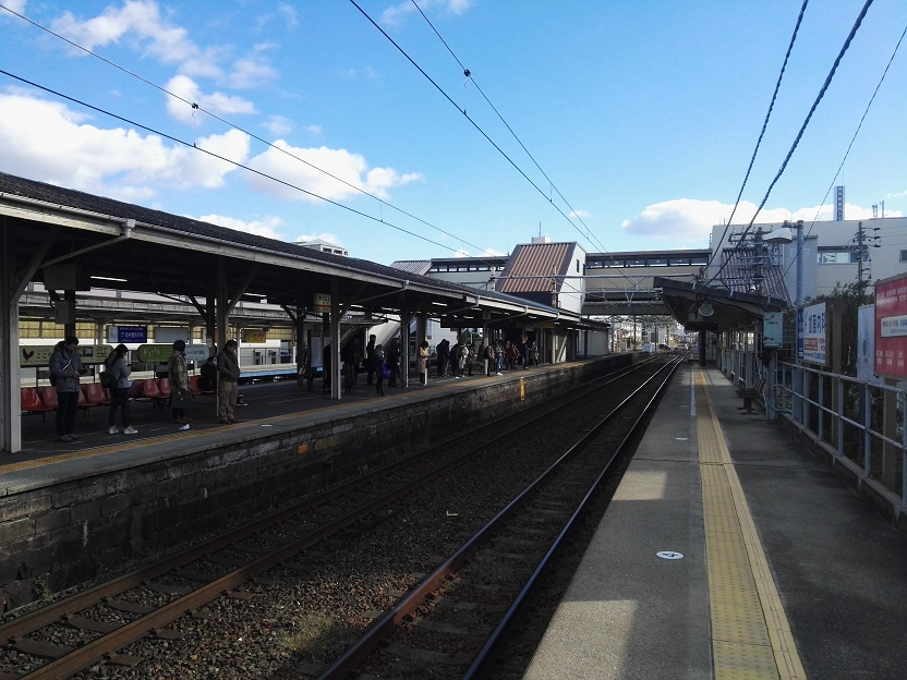 Anjo station platform